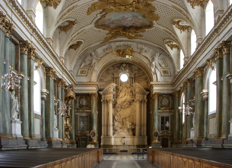 Slottskyrkan, Stockholms slott